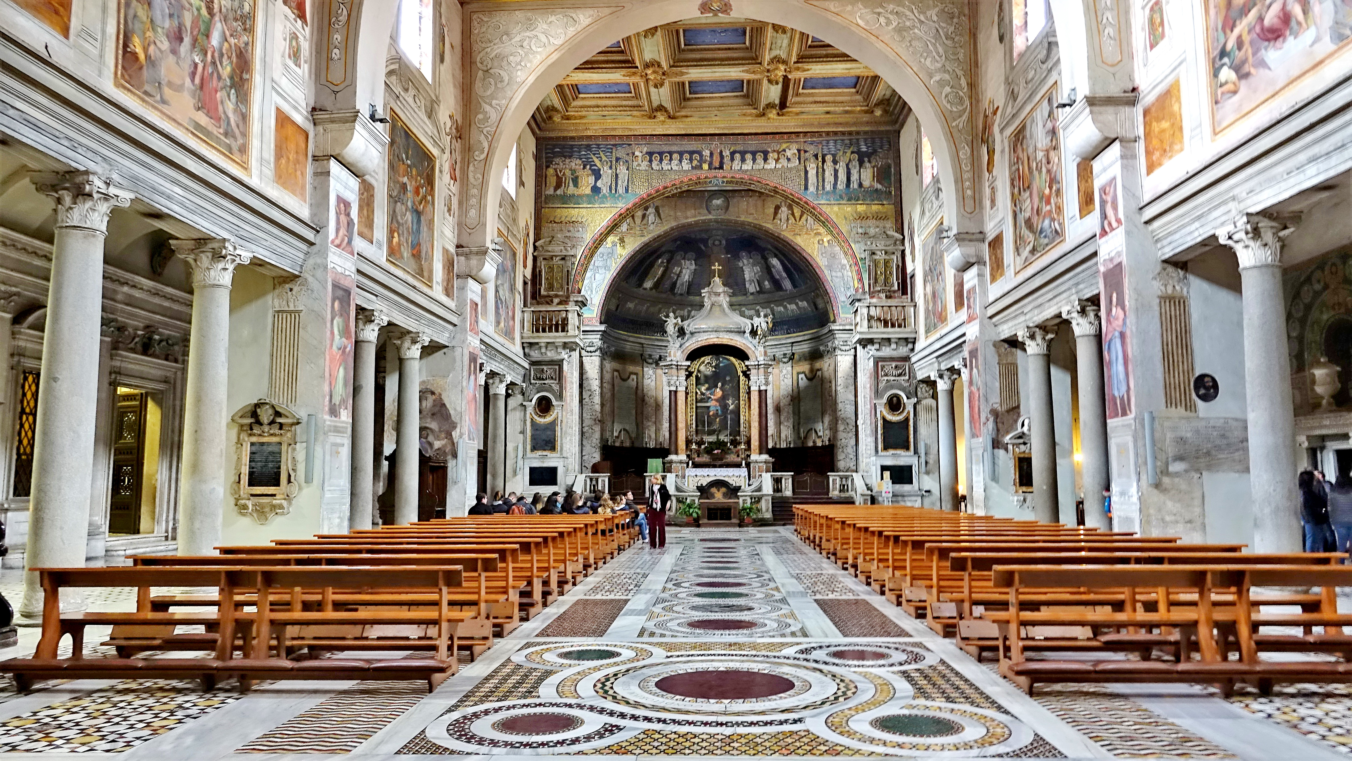 Navata centrale